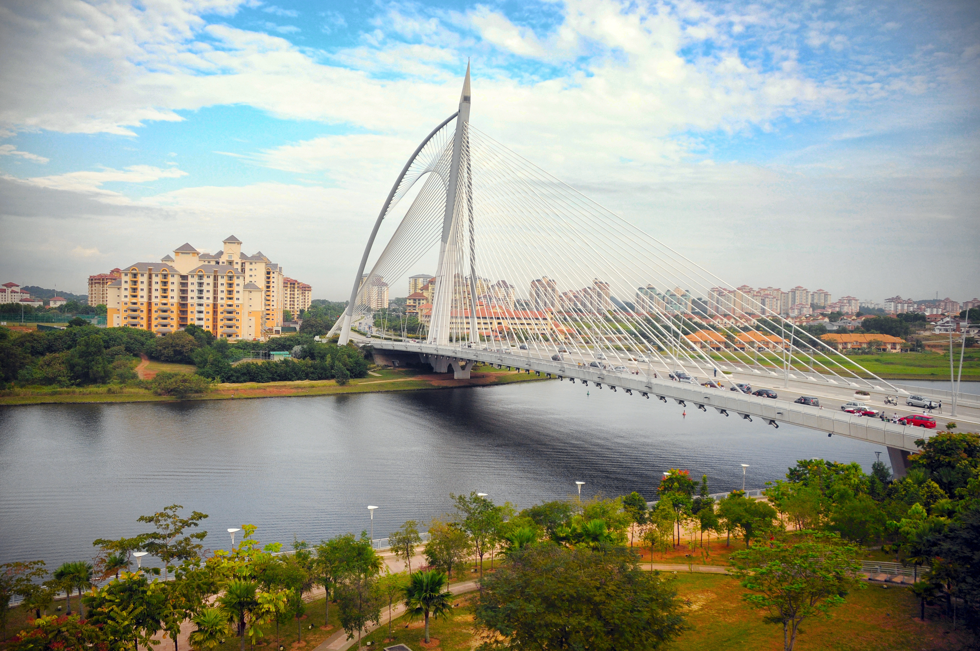 Jambatan Seri Wawasan